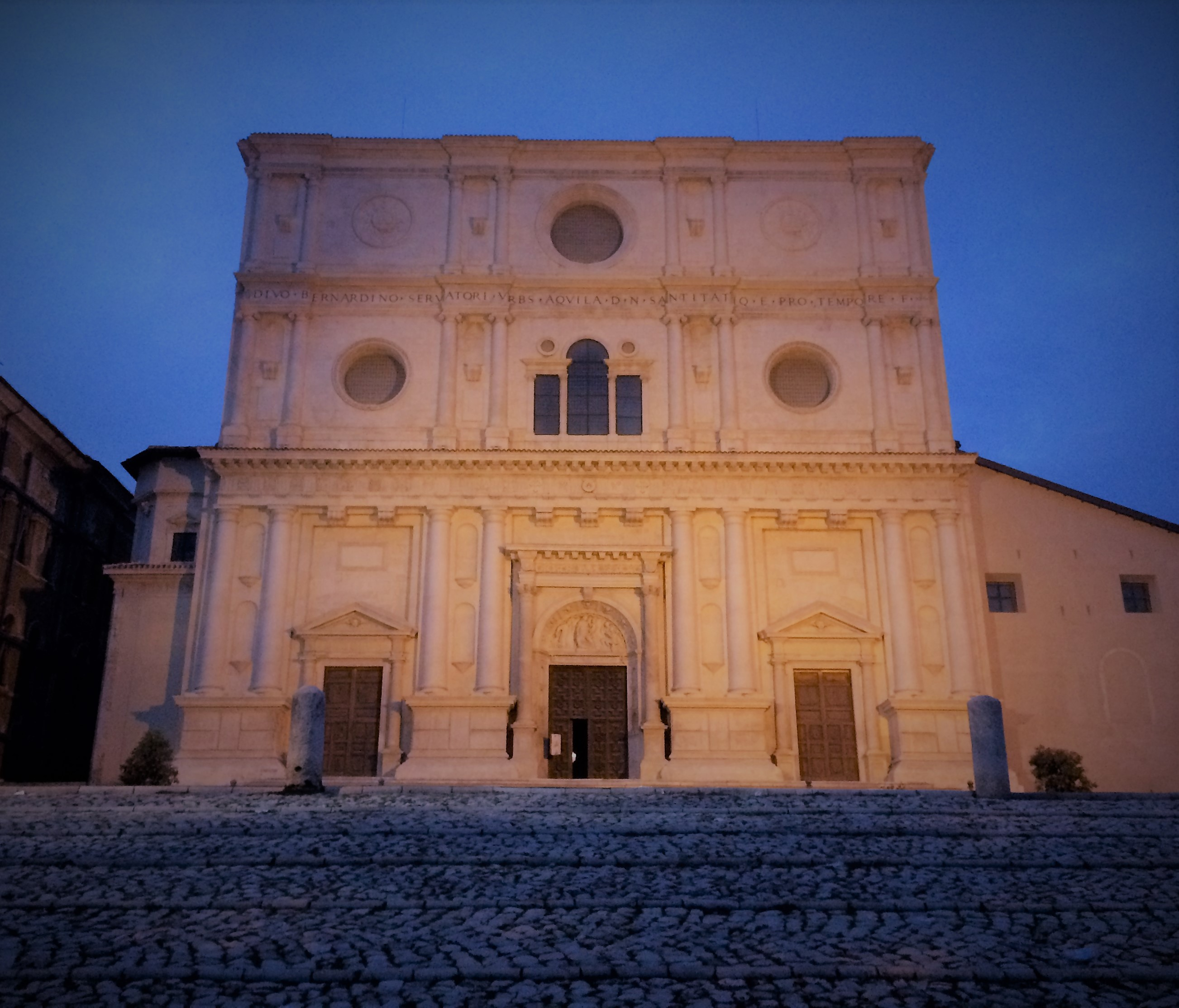 Visuale notturna della basilica di San Bernardino all'Aquila dalla scalinata monumentale.